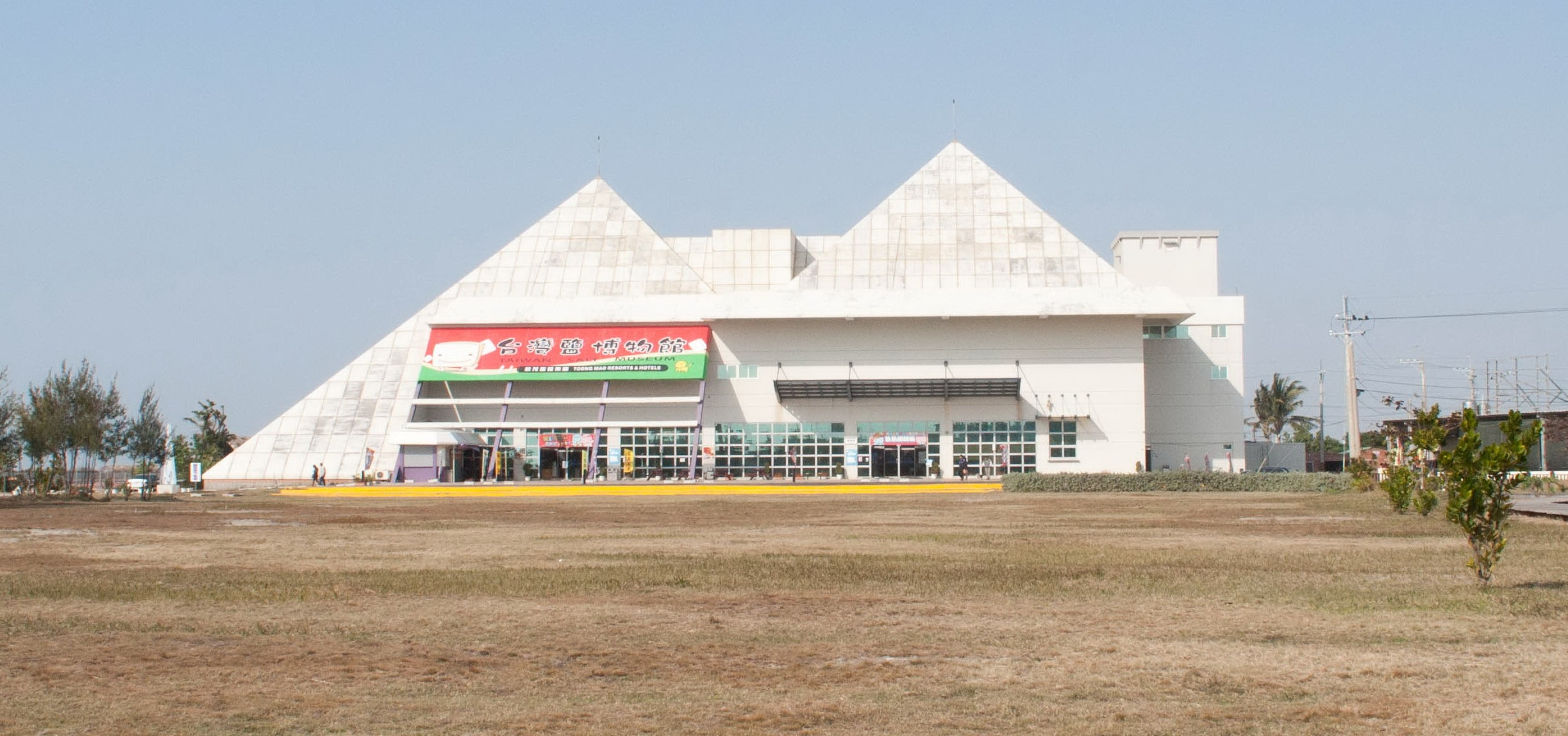 臺灣鹽博物館（拍攝地點：台南市七股區中寮臺灣鹽博物館門口拍攝）